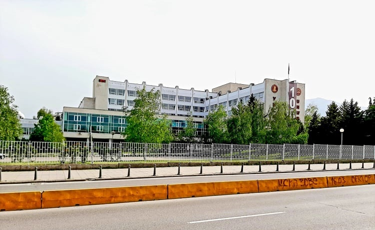 Крило А и Б на УНСС